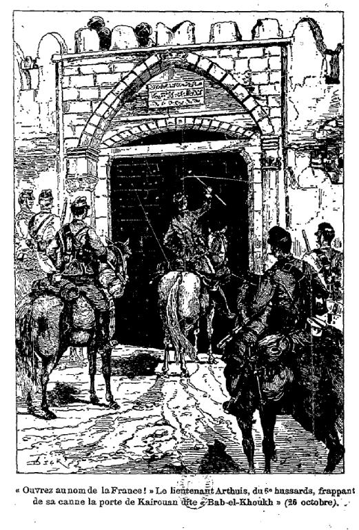 Le lieutenant Arthuis frappant à Bab El Khoukh à Kairouan le 26.10.1881, Tunisie